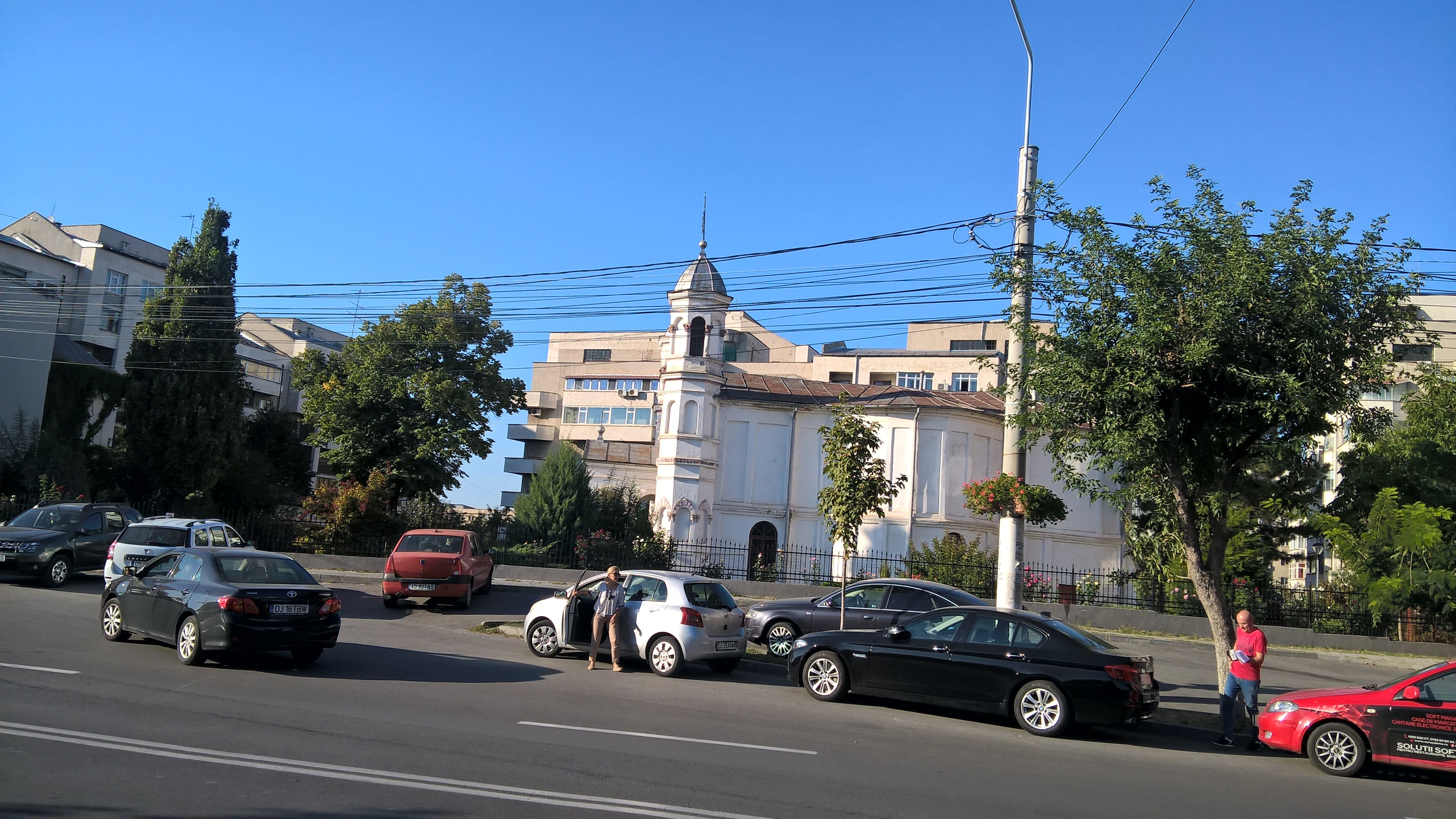 Ansamblul bisericii „Toți Sfinții” - Hagi Enuș